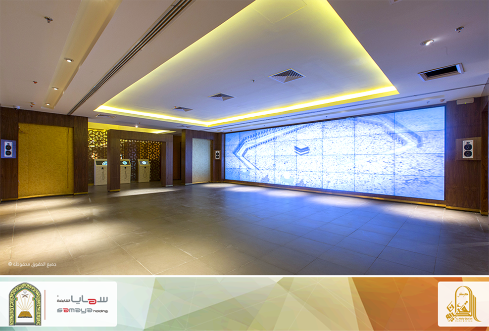 صورة من قاعة العرض المرئي